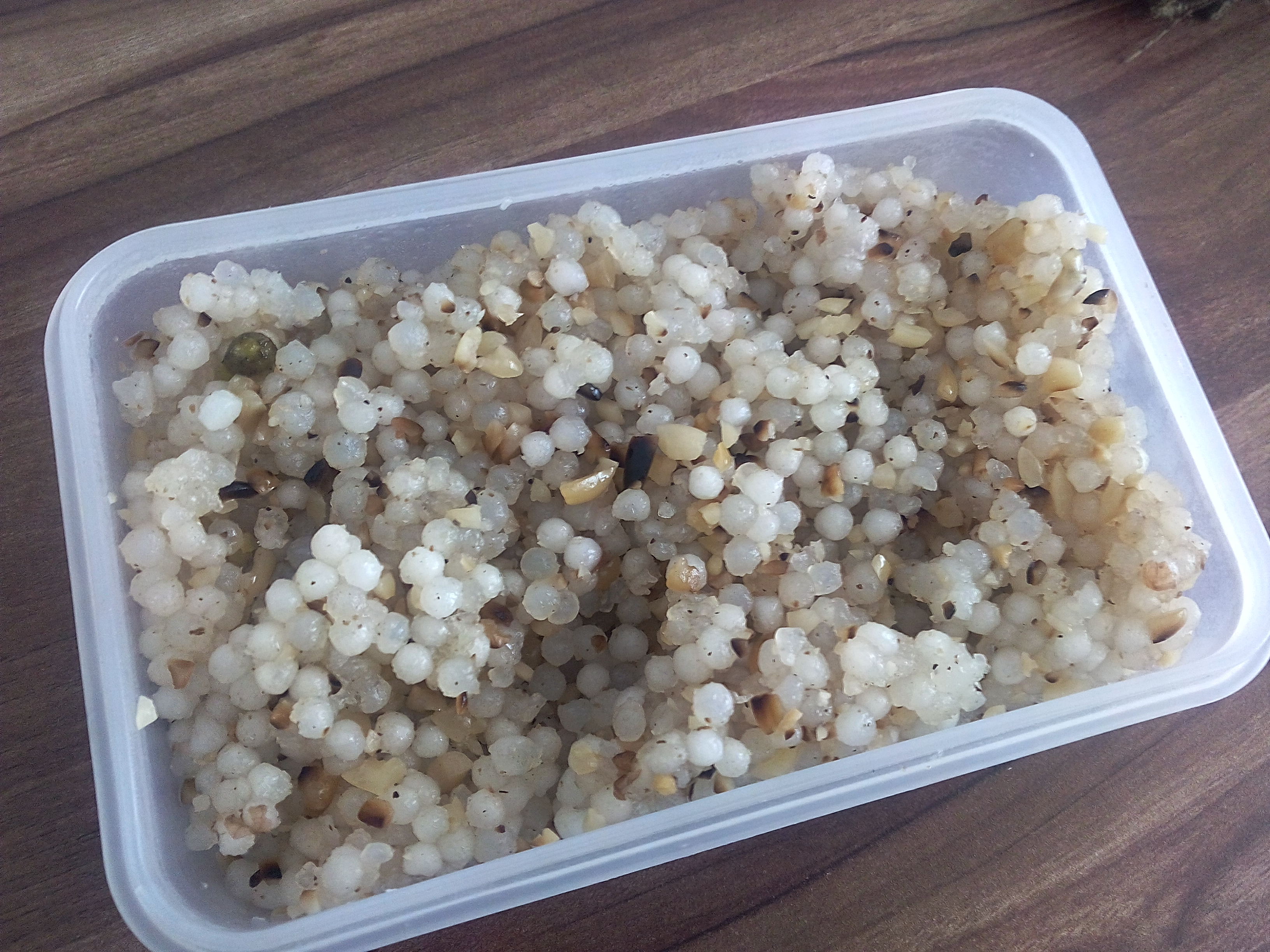 Sabudana Khichadi